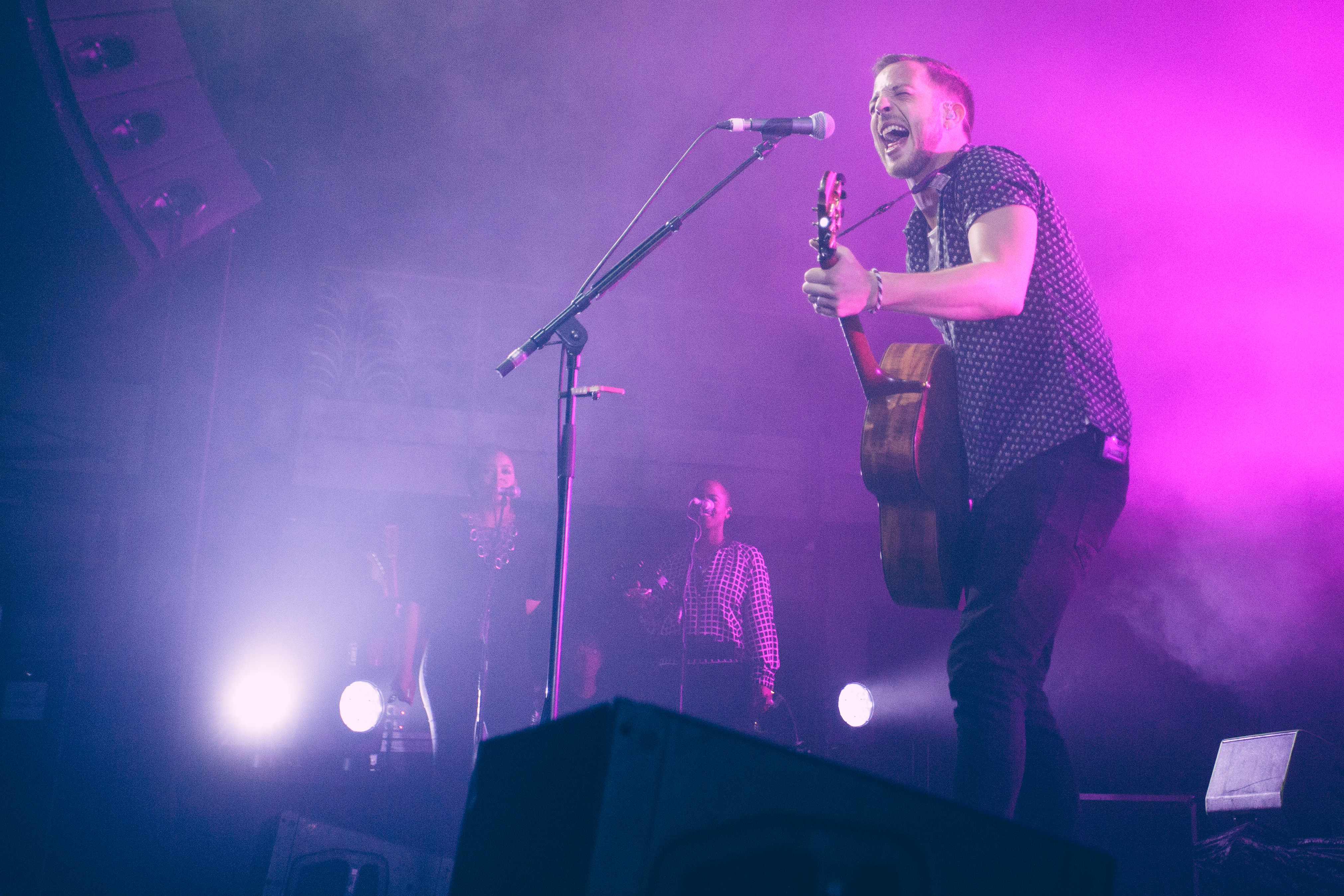 James Morrison on Higher than Here Tour (2016), E-Werk, Köln (DEU) /// leokreissig.de for NRW-Konzerte